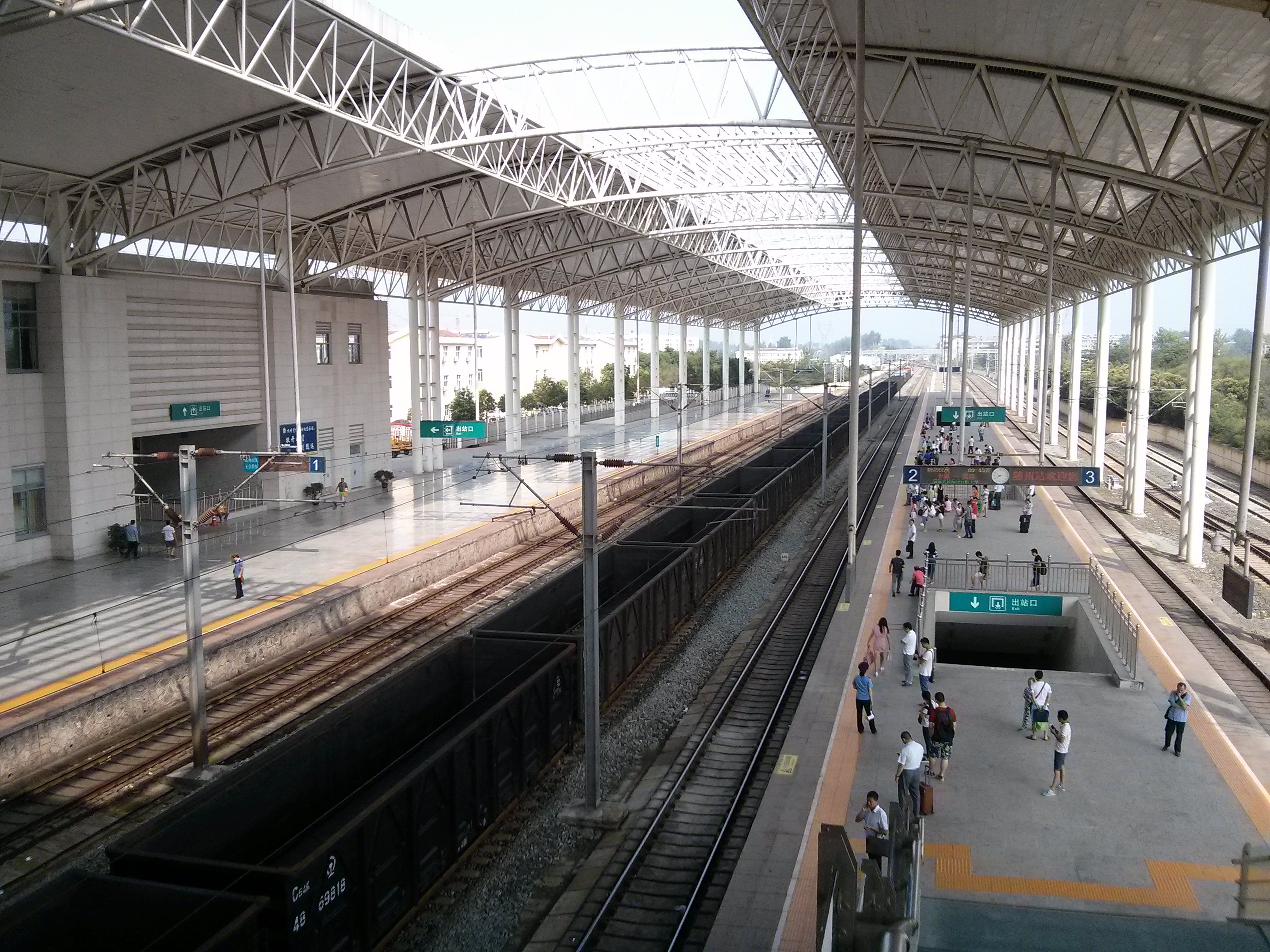 随州火车站站内